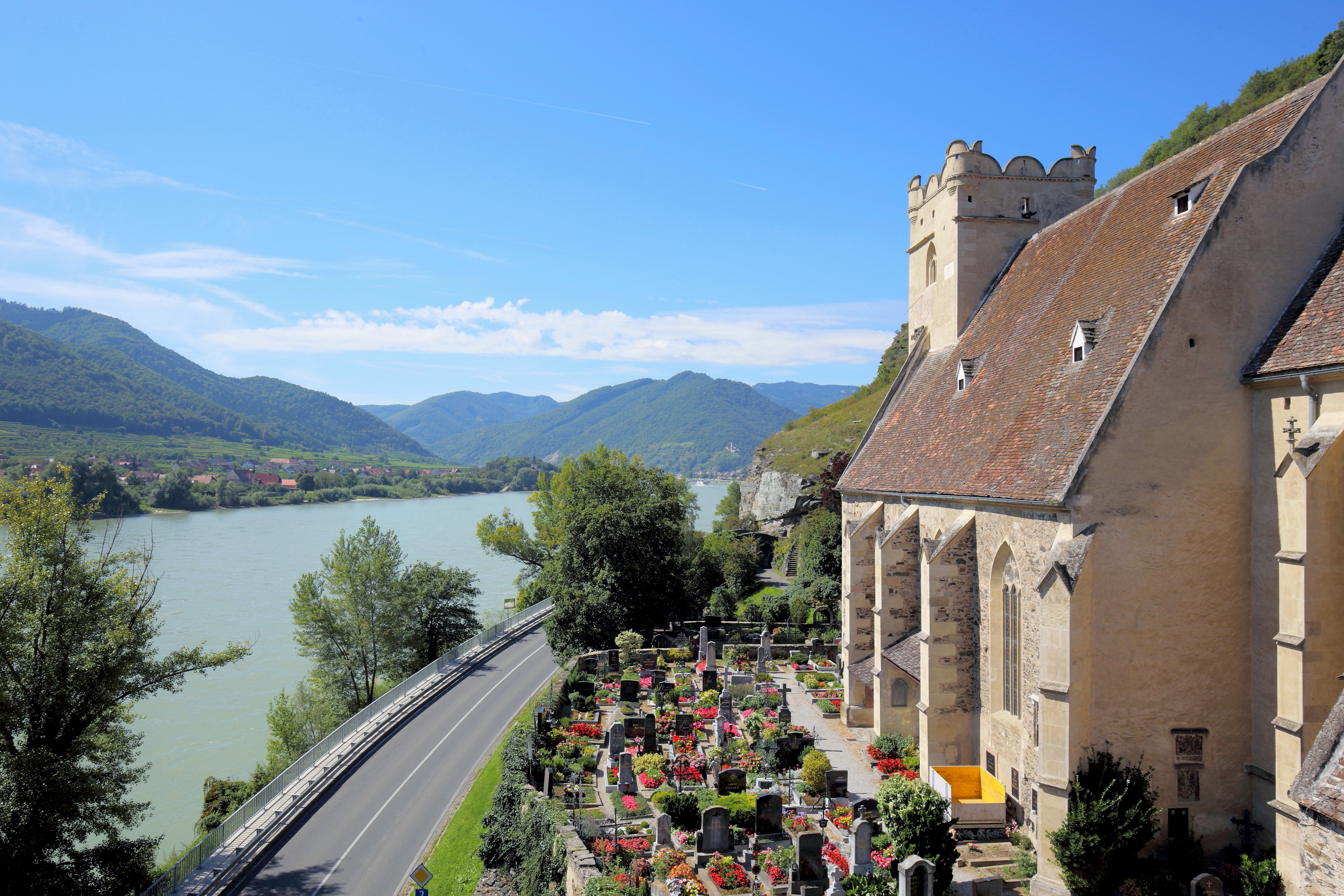 Blick vom Wehrturm in St. Michael, ein Ortsteil der niederösterreichischen Marktgemeinde Weißenkirchen in der Wachau, stromaufwärts. Rechts die älteste Kirche der Wachau, die Wehrkirche St. Michael und links die Ortschaft Mitterarnsdorf, ein Ortsteil der Marktgemeinde Rossatz-Arnsdorf.